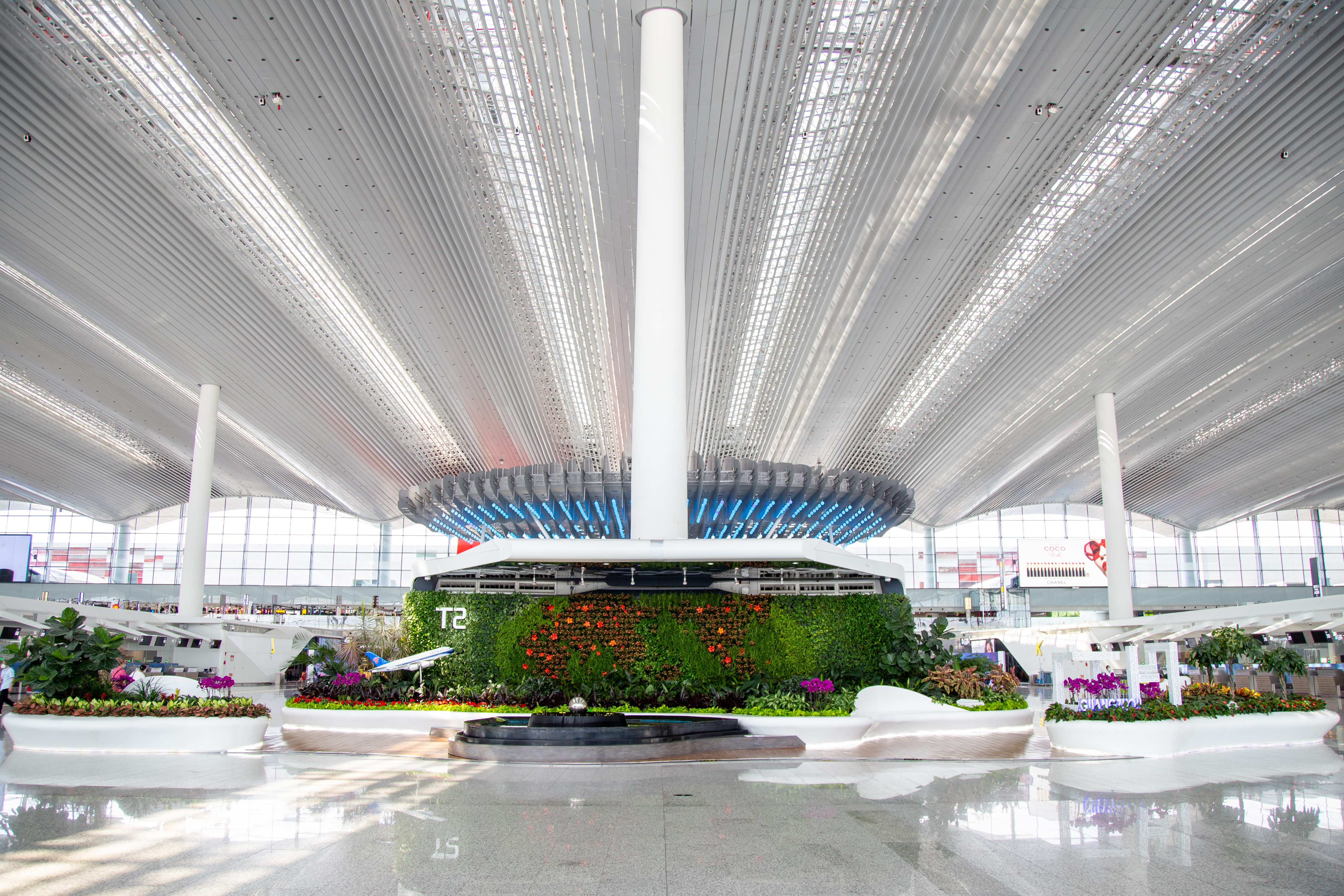 中文（香港）: 廣州白雲國際機場二號客運大樓出發大堂中庭花壇